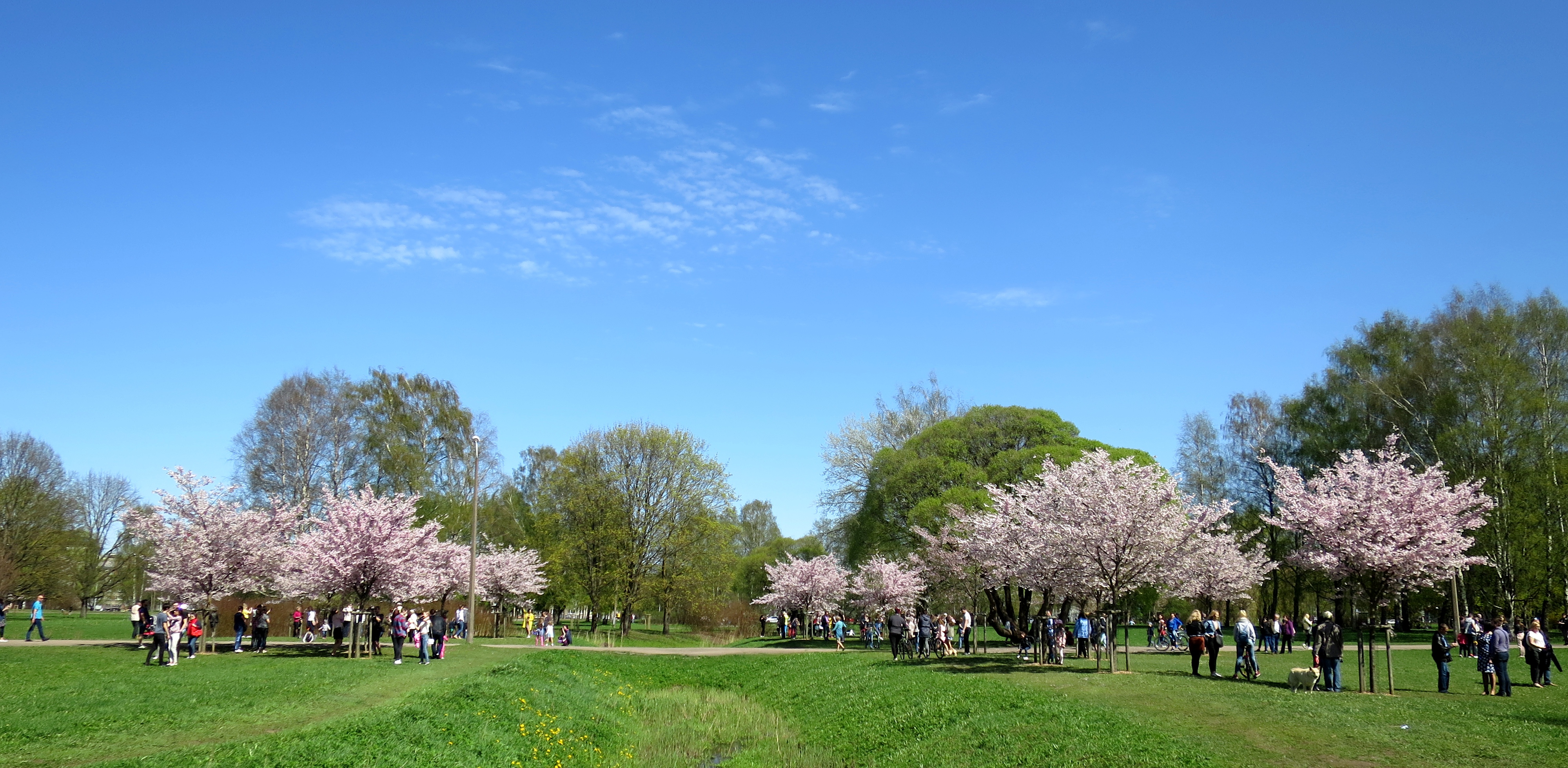 Zied sakuras Rīgā, Uzvaras parkā